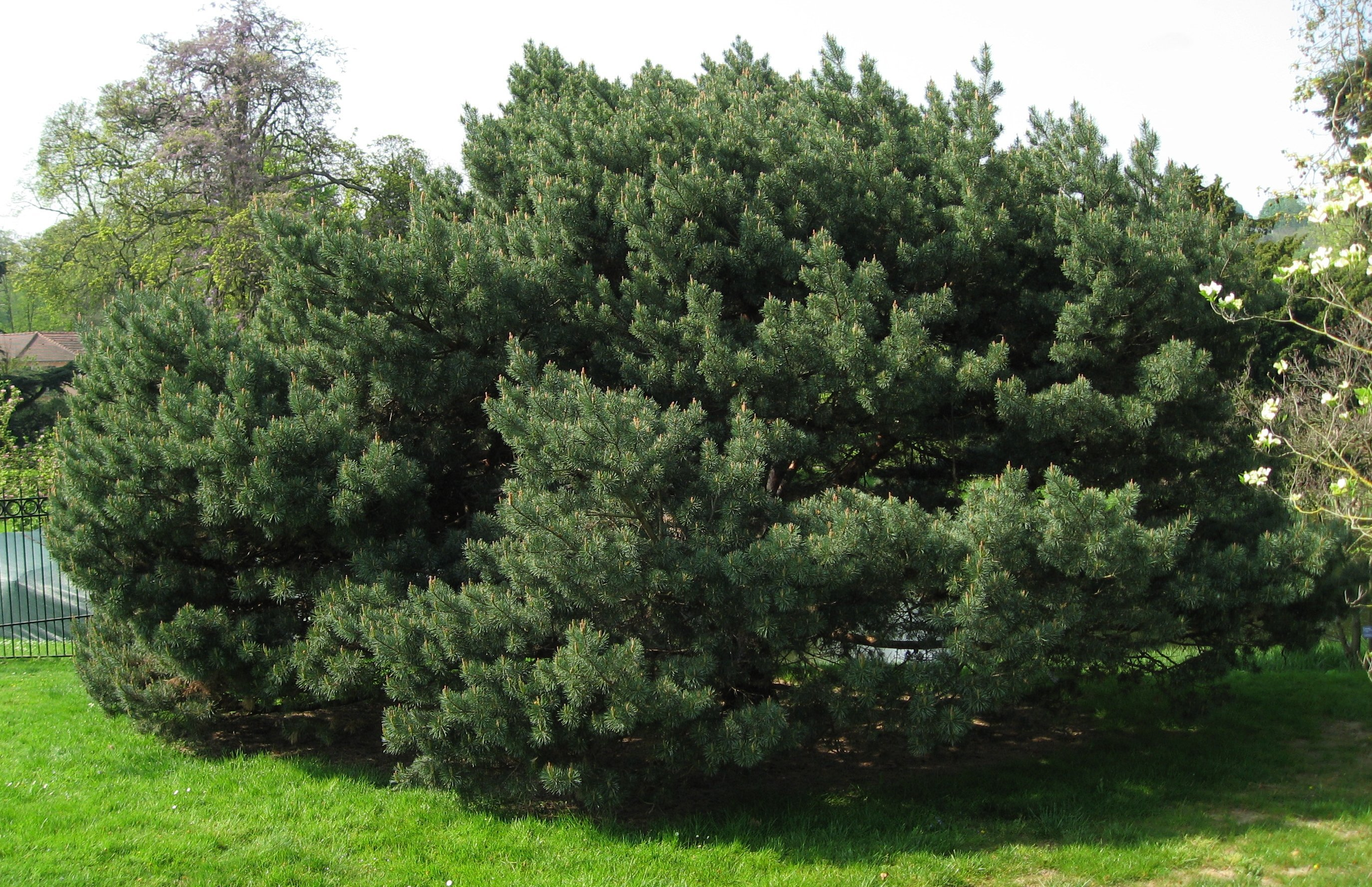 Pinus sylvestris 'Watereri' (Pin sylvestri de Waterer) in Arboretum de la Vallée-aux-Loups Map: 48° 46' 22" N 2° 16' 5" E